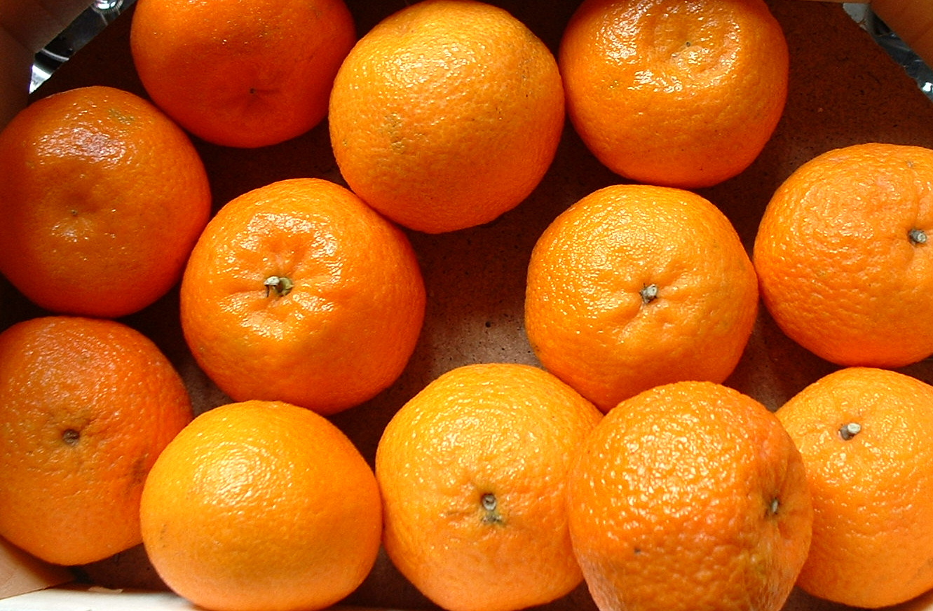 clementines